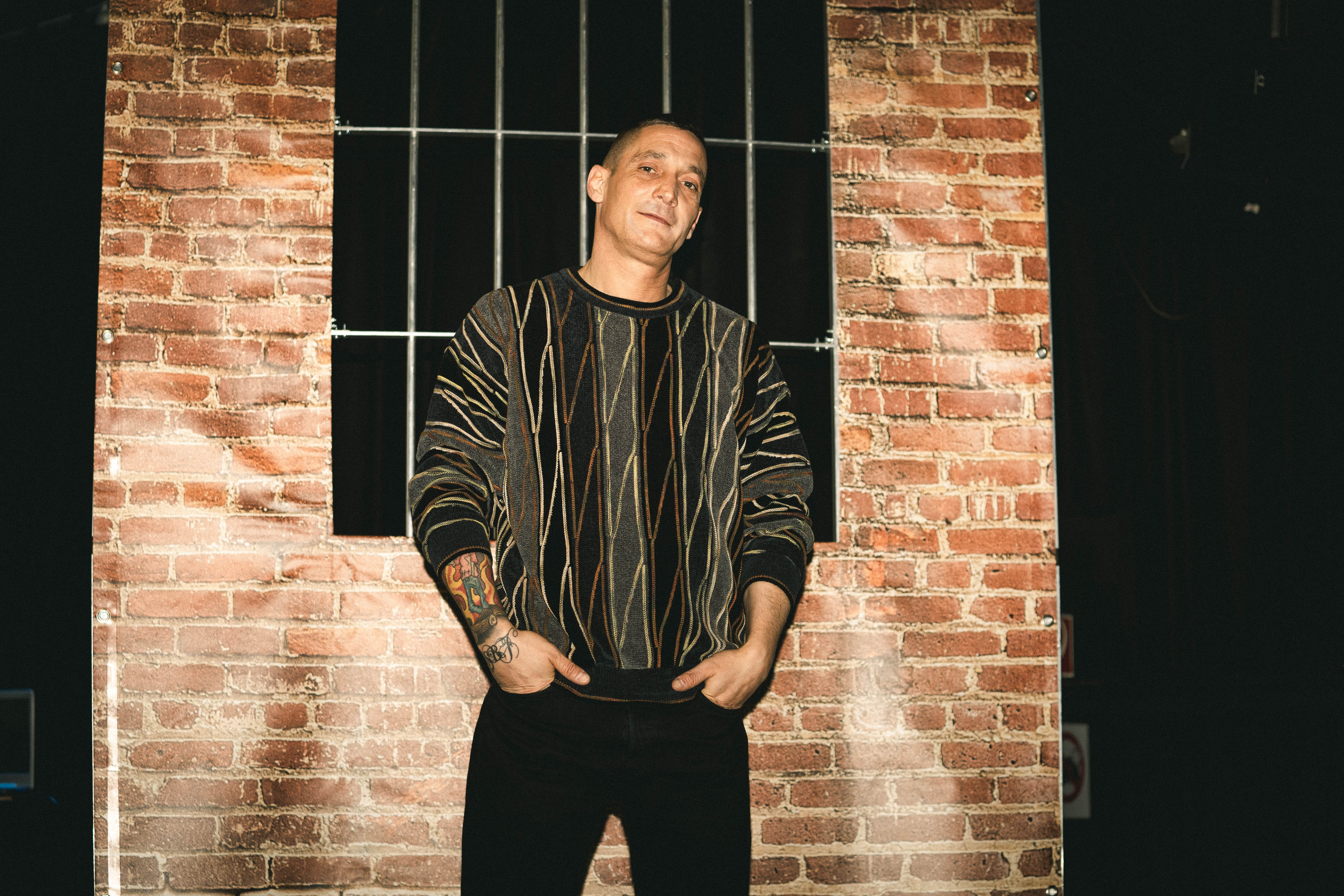 $ick auf Shore, Stein Papier Tour